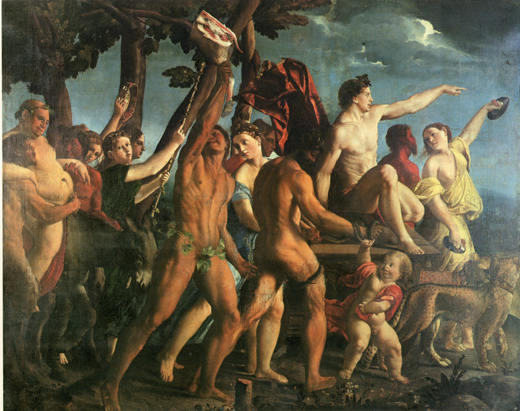 Trionfo di BaccoTriumph of Bacchus